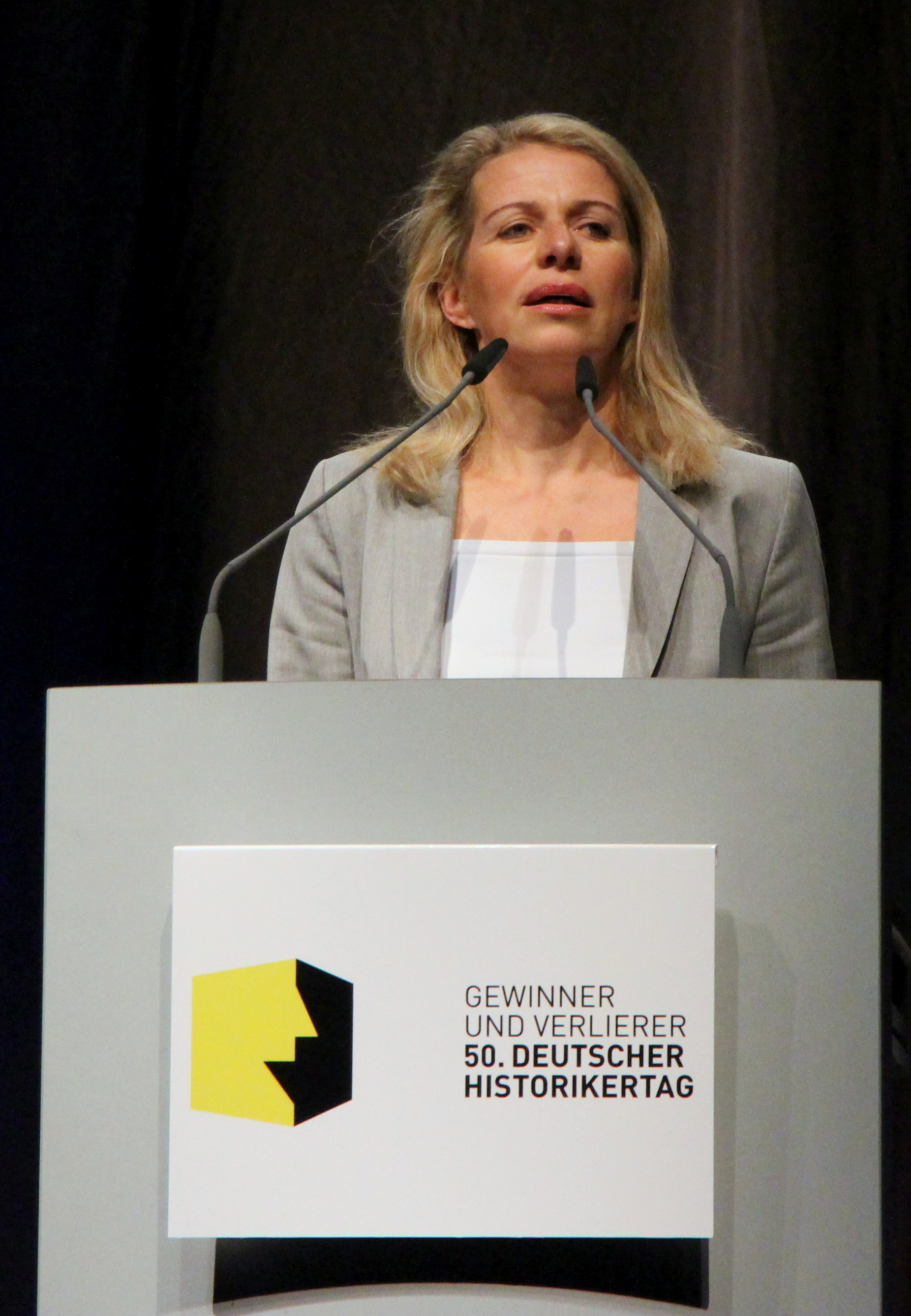 Sitta von Reden beim Historikertag 2014 in Göttingen.